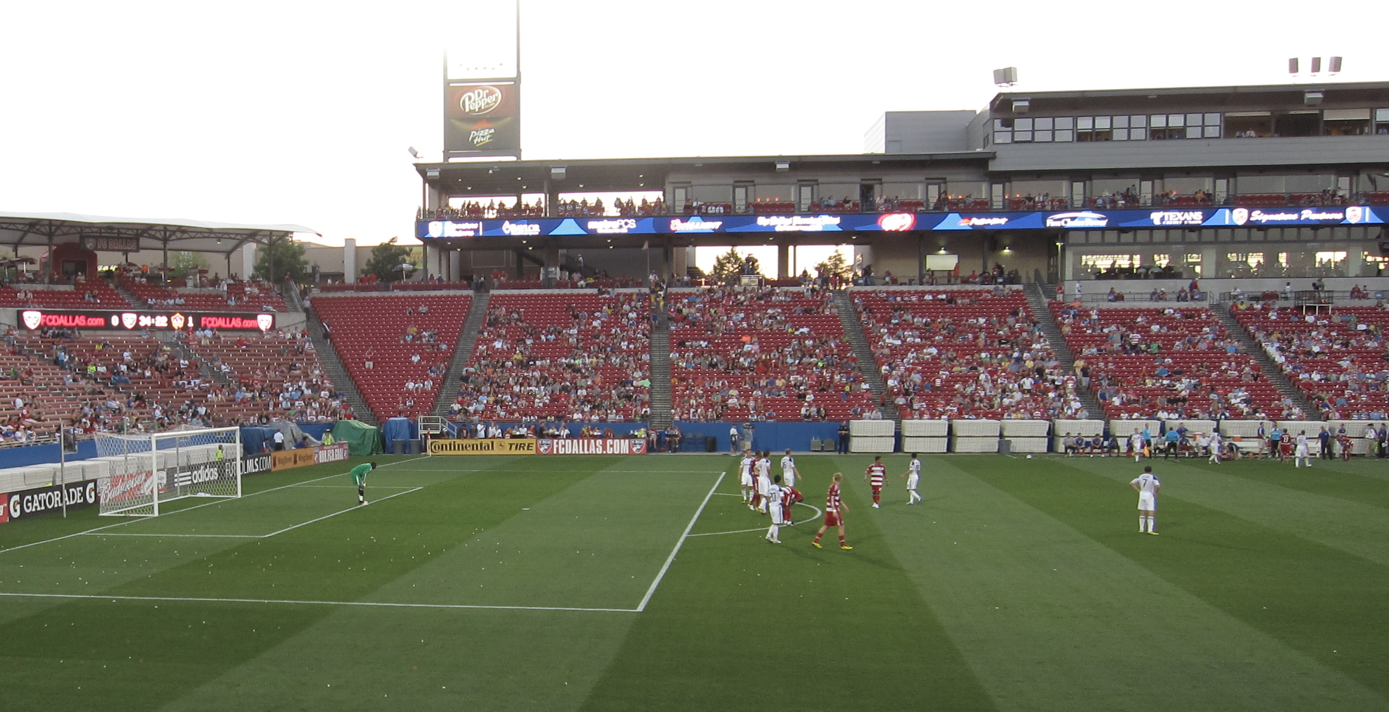 vs LA Galaxy